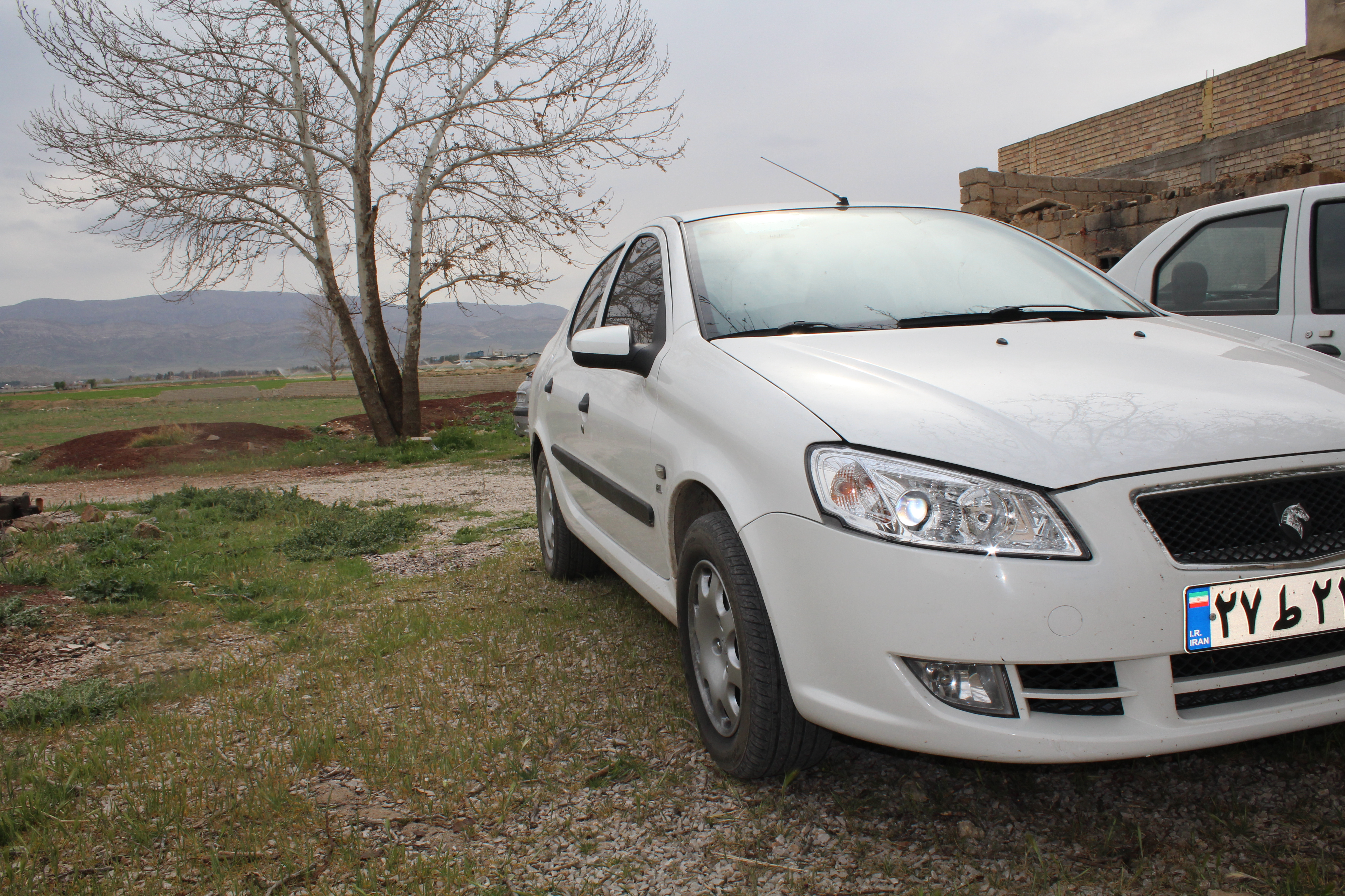 خودروی رانا